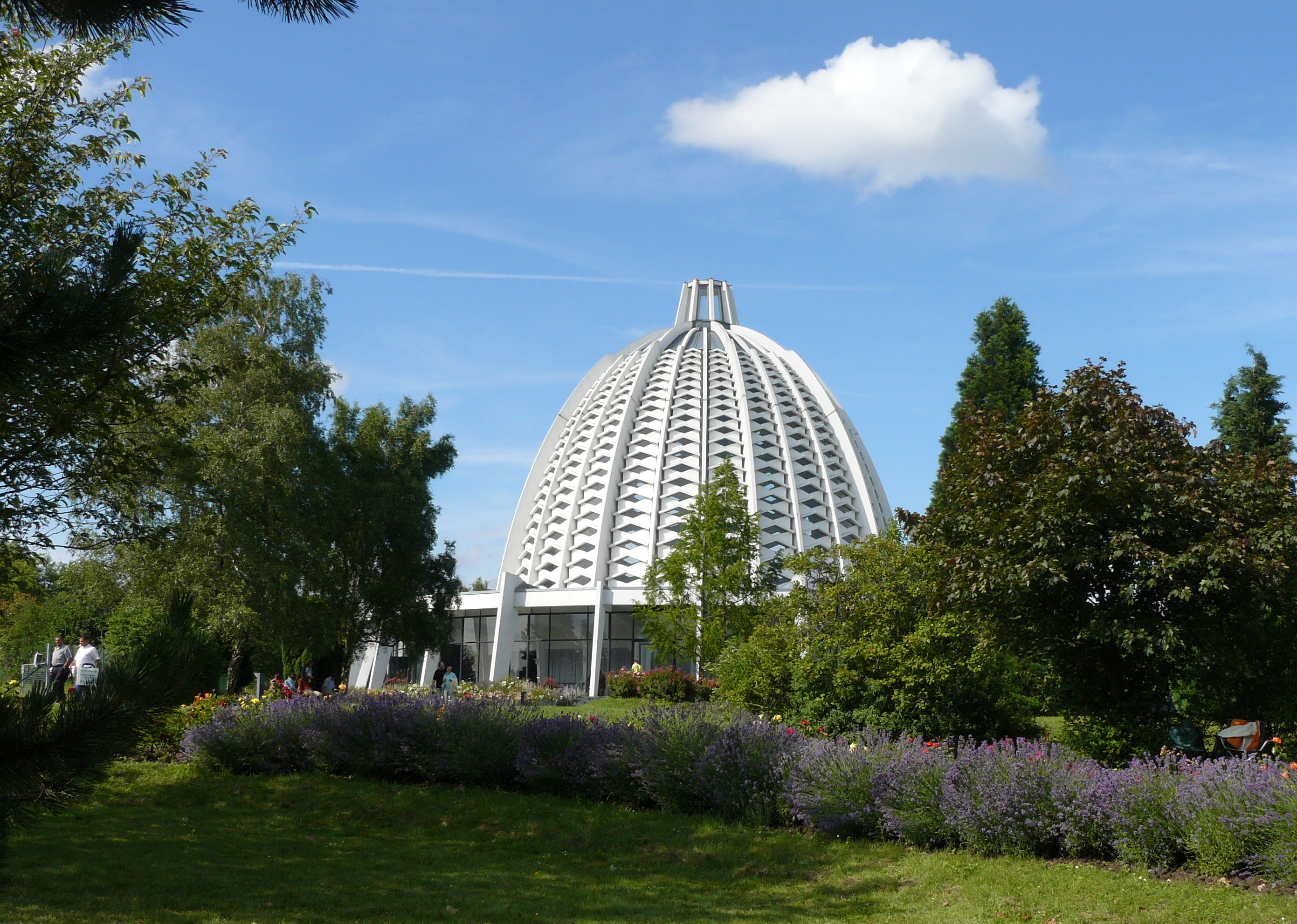 Europäisches Haus der Andacht in Hofheim-Langenhain im Sommer 2007